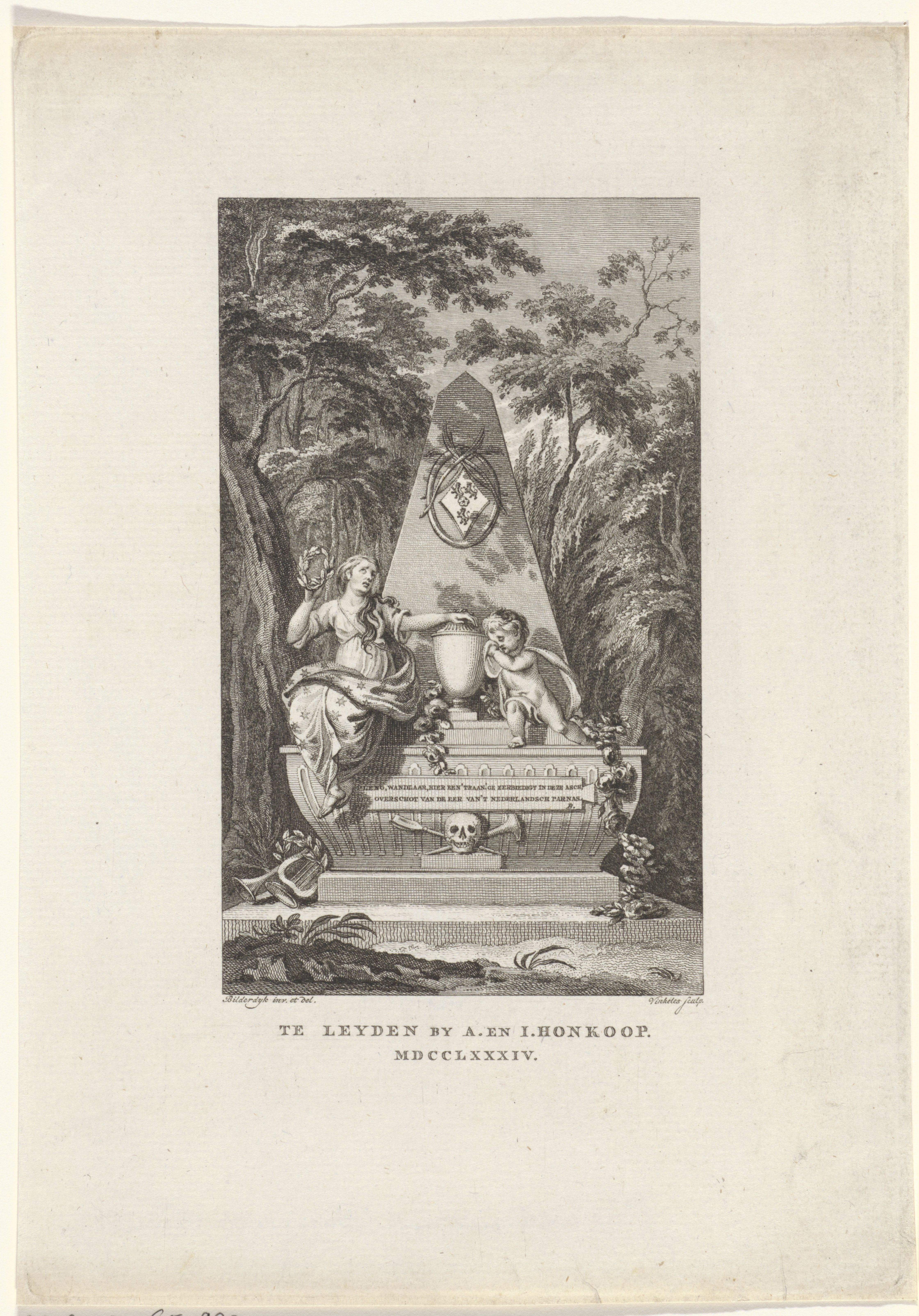 IdentificatieTitel(s): Gedenkzuil voor Juliana Cornelia de LannoyObjecttype: prent Objectnummer: RP-P-OB-65.990Catalogusreferentie: Collectie Rijksmuseum-1(2)Opmerking: staat bepaald aan de hand van aanwezige prenten in RijksprentenkabinetOpschriften / Merken: verzamelaarsmerk, verso, gestempeld: Lugt 2228Omschrijving: Gedenkzuil in een bos voor de dichteres Juliana Cornelia de Lannoy. Op het monument een huilende putto en een treurende vrouw.VervaardigingVervaardiger: prentmaker: Reinier Vinkeles (I) (vermeld op object)naar tekening van: Bilderdijk (vermeld op object)uitgever: Jan Honkoop (vermeld op object)Plaats vervaardiging: prentmaker: Amsterdamuitgever: LeidenDatering: 1784Fysieke kenmerken: ets en gravure; proefdrukMateriaal: papier Techniek: etsen / graveren (drukprocedé)Afmetingen: plaatrand: h 232 mm × b 160 mmOnderwerpWat: forest, woodmourning the deadcupids: 'amores', 'amoretti', 'putti'grave, tombVerwerving en rechtenVerwerving: onbekendCopyright: Publiek domein